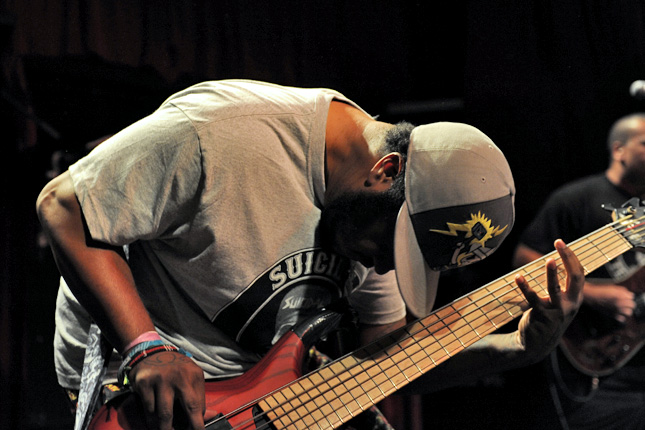 Suicidal Tendencies @ Capitol (18/5/2011)